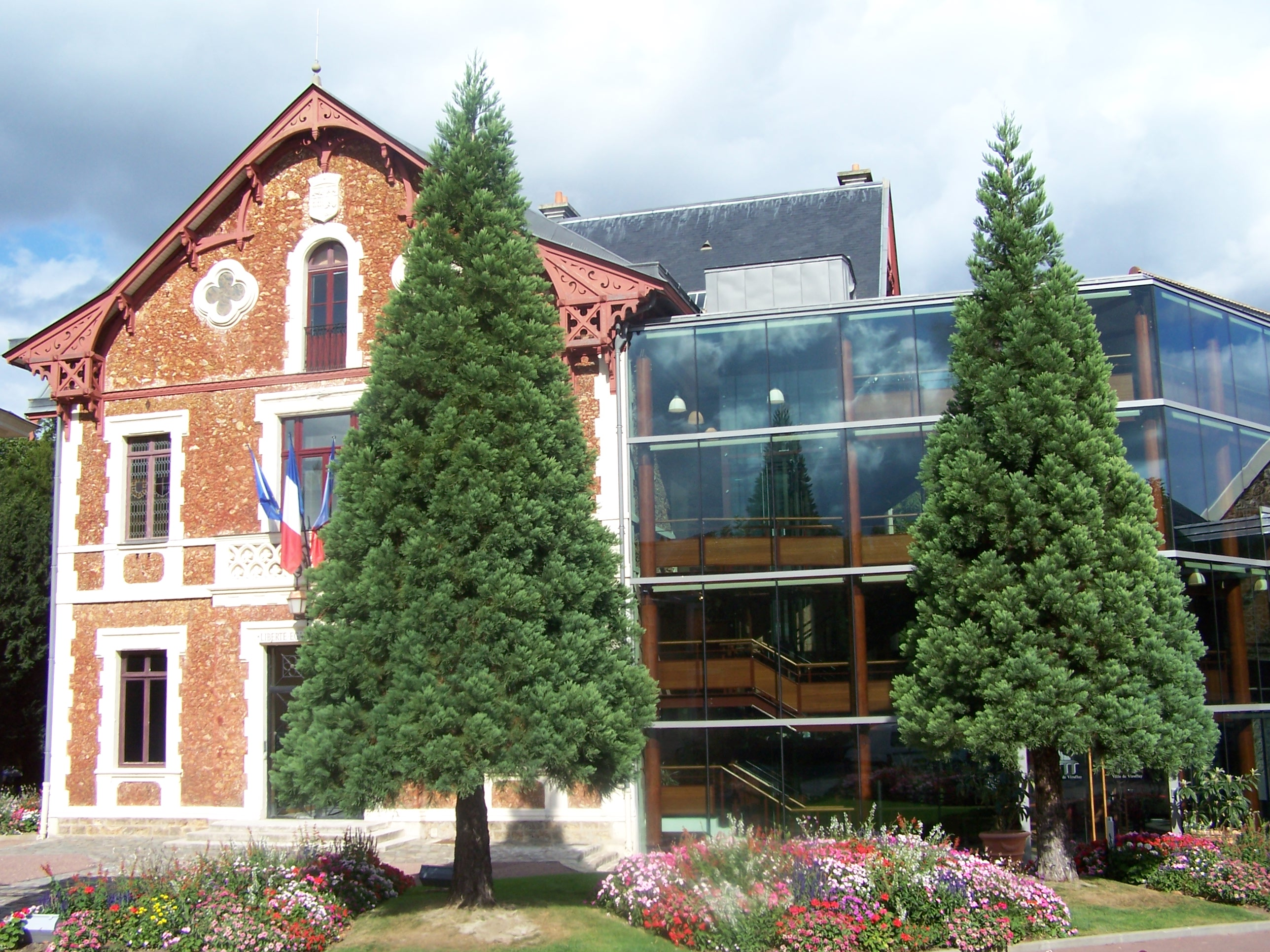 Mairie de Viroflay (Yvelines, France)